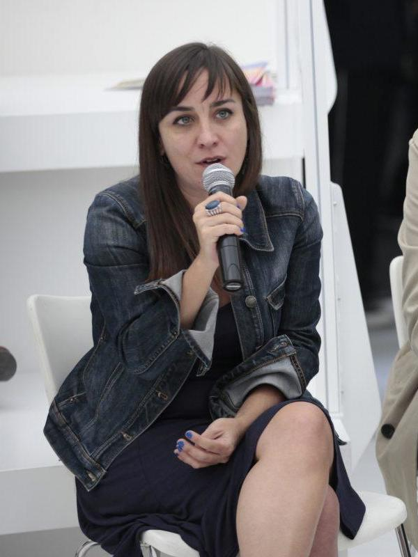 Una jornada más en la Feria Internacional del Libro de Guadalajara en la que el debate literario se ha alternado con la música, teatro y análisis de los retos de las ciudades. En este penúltimo día de la Feria del Libro de Guadalajara, el acento social lo pusieron Saskia Sassen -socióloga, escritora y profesora holandesa, Premio Príncipe de Asturias de Ciencias Sociales- y Marisol Mena, directora general de Intervención en el Paisaje Urbano y Patrimonio Cultural del Ayuntamiento, en una diálogo denominado La ciudad en su circunstancia: la construcción de la ciudad.